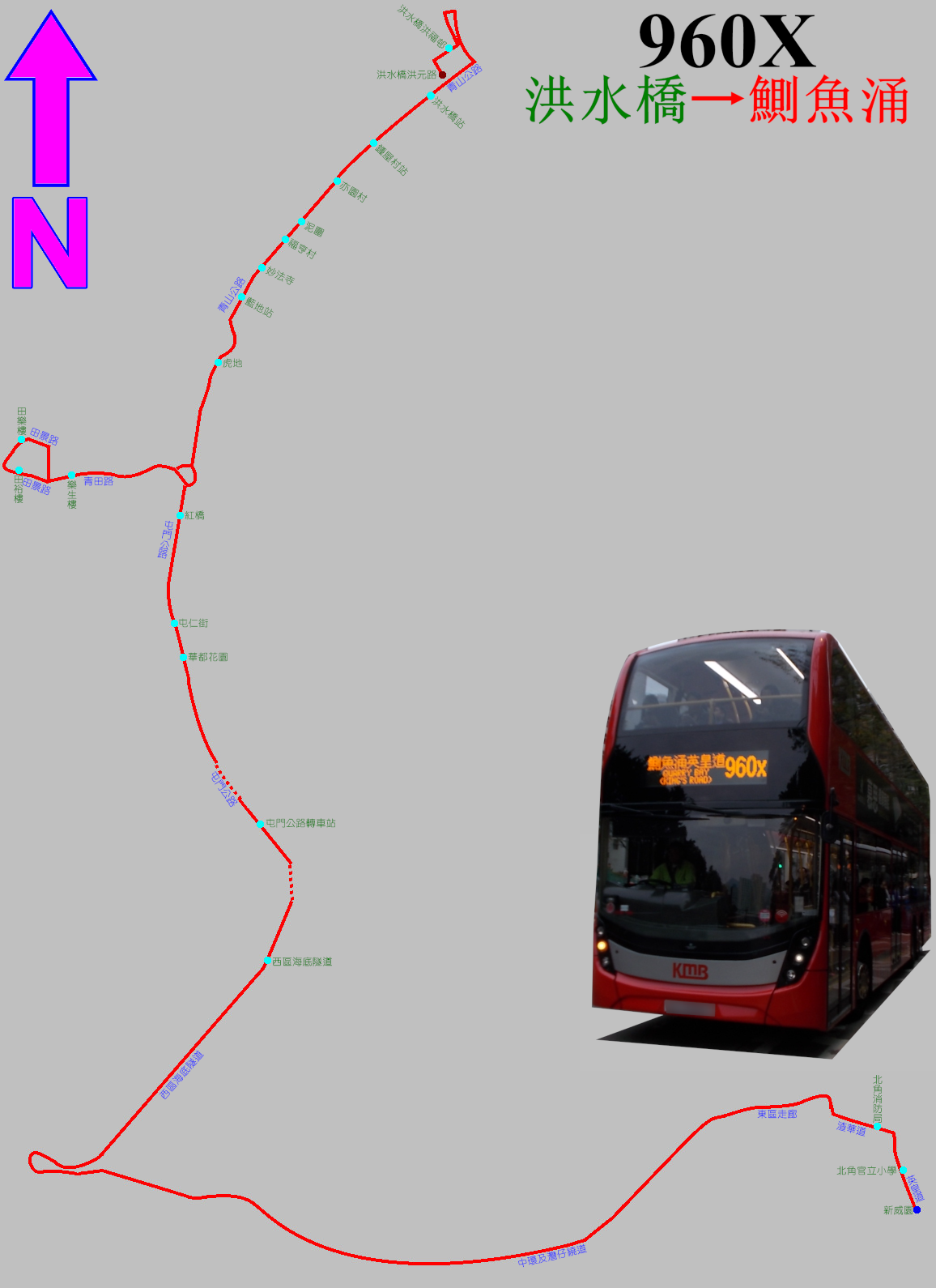 中文（香港）: 過海隧巴960X線的走線圖